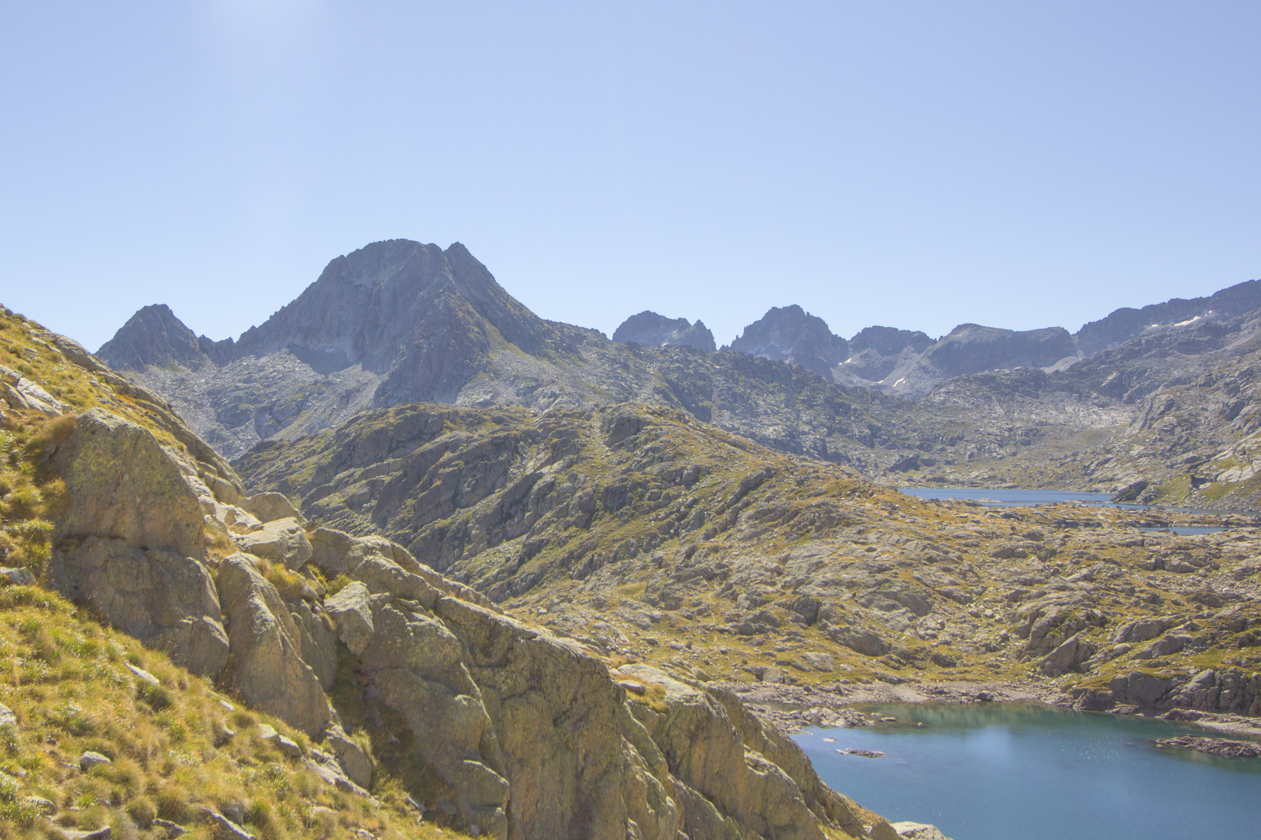 Grinches de Tòrt i Tossau de Mar, circ de Tòrt (vall d'Aran)